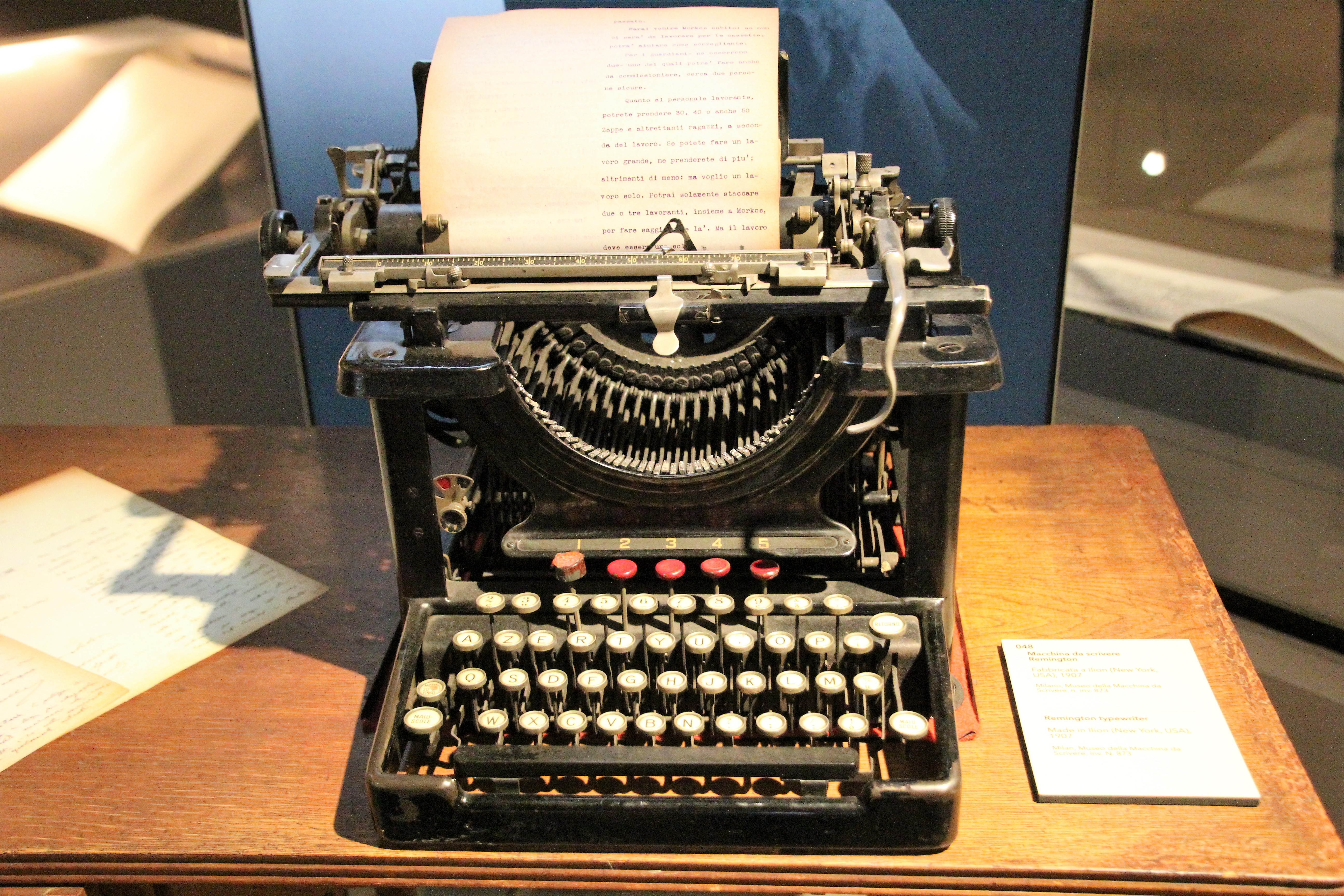 Remington typewriter 1907, presso il museo Egizio